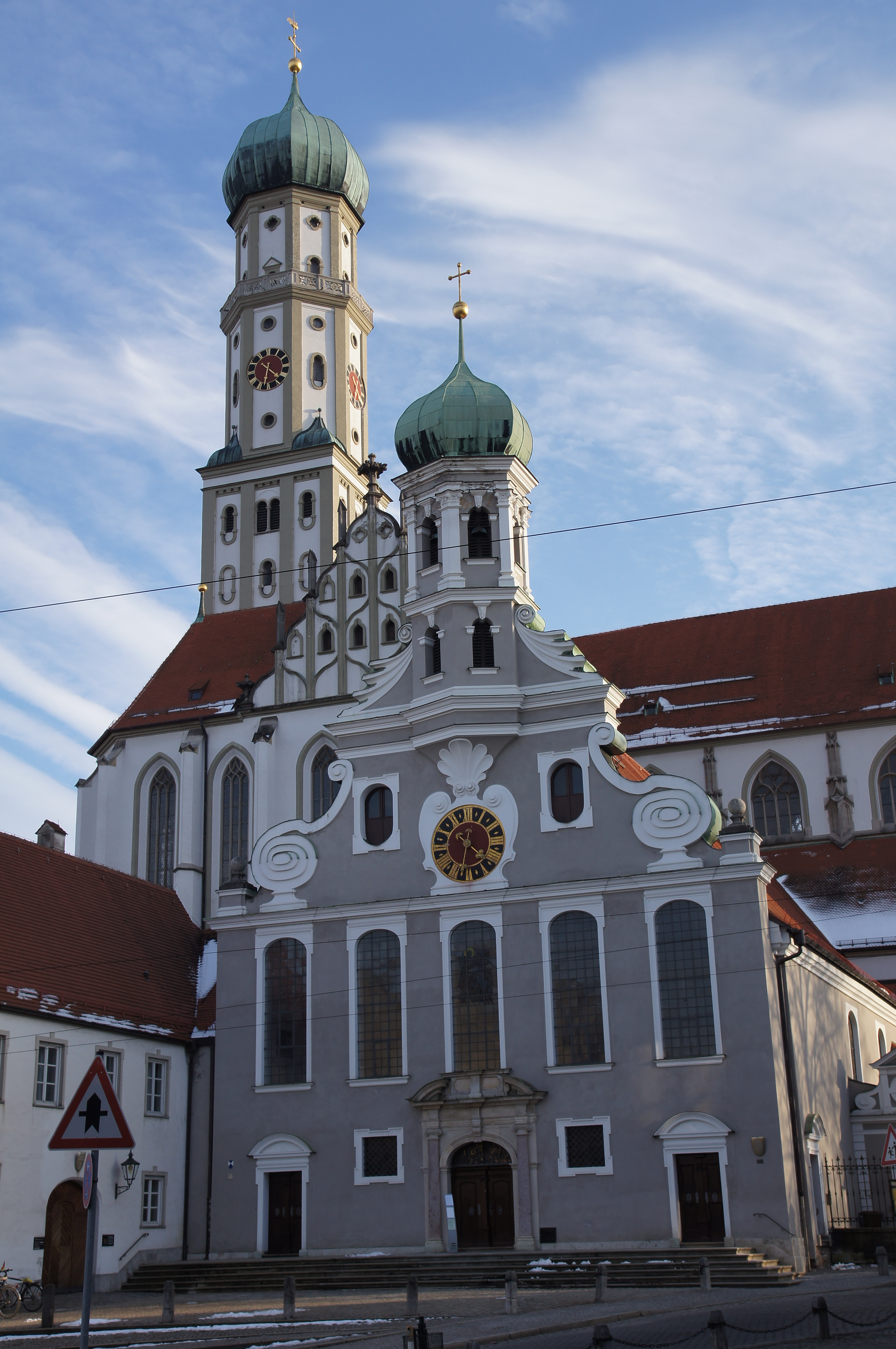 2011-02-26 Augsburg 095 Basilika St. Ulrich und Afra.jpg